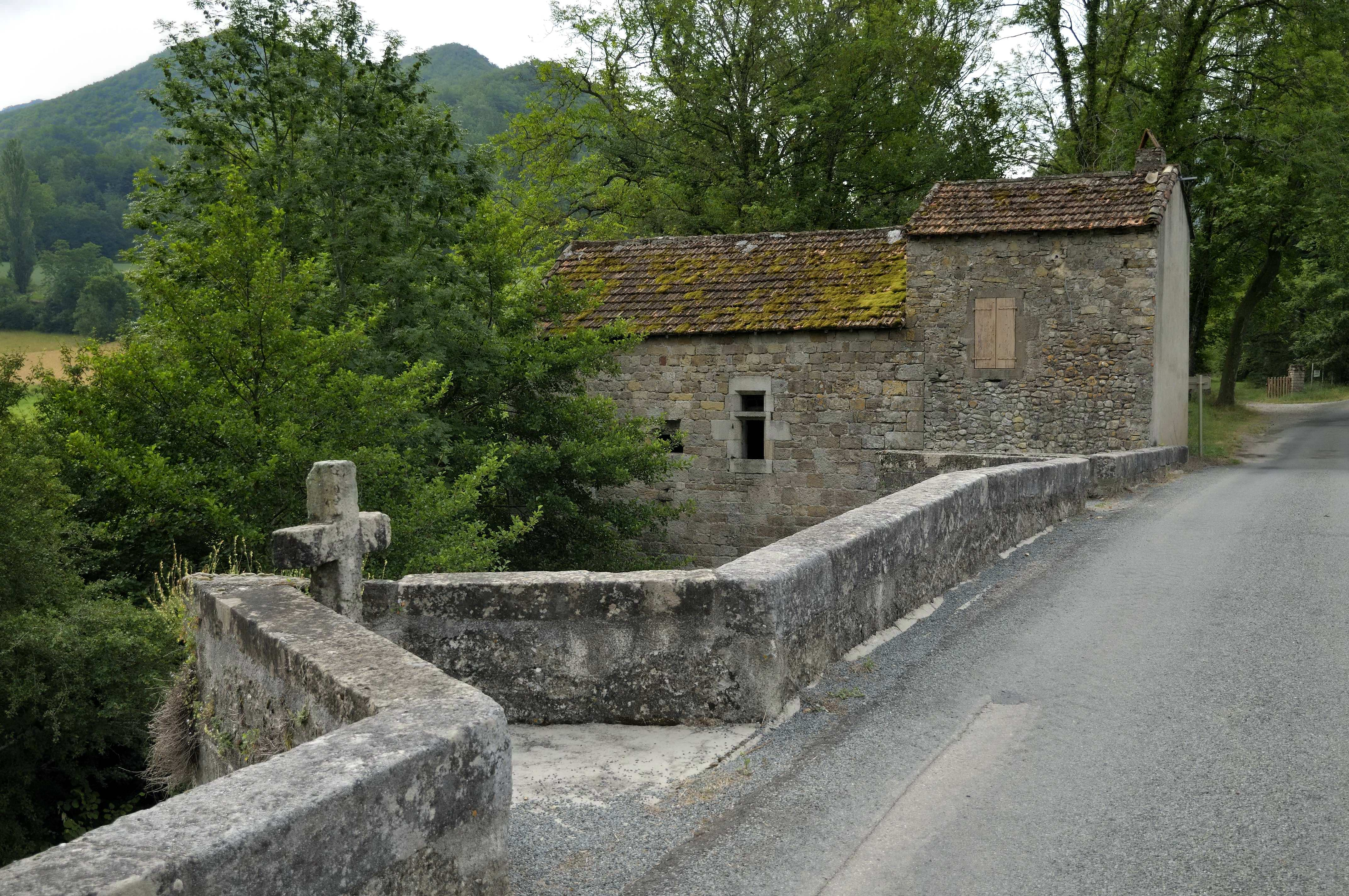 pont roman du XIVe siècle franchissant l'Orb à Ceilhes (Hérault)